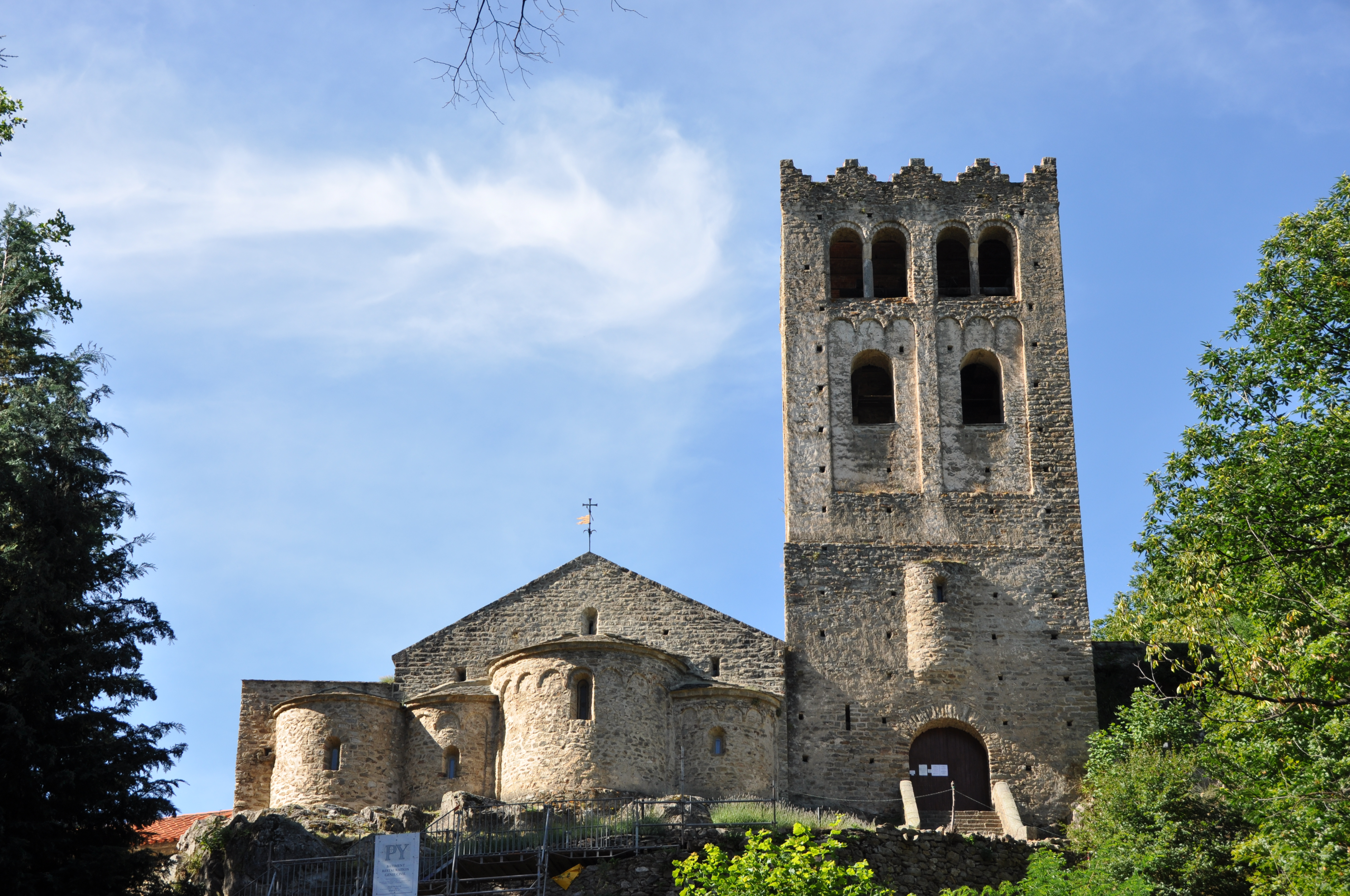 Castell de Vernet. St Martí del Canigó Abbey. Apse. 11th C.